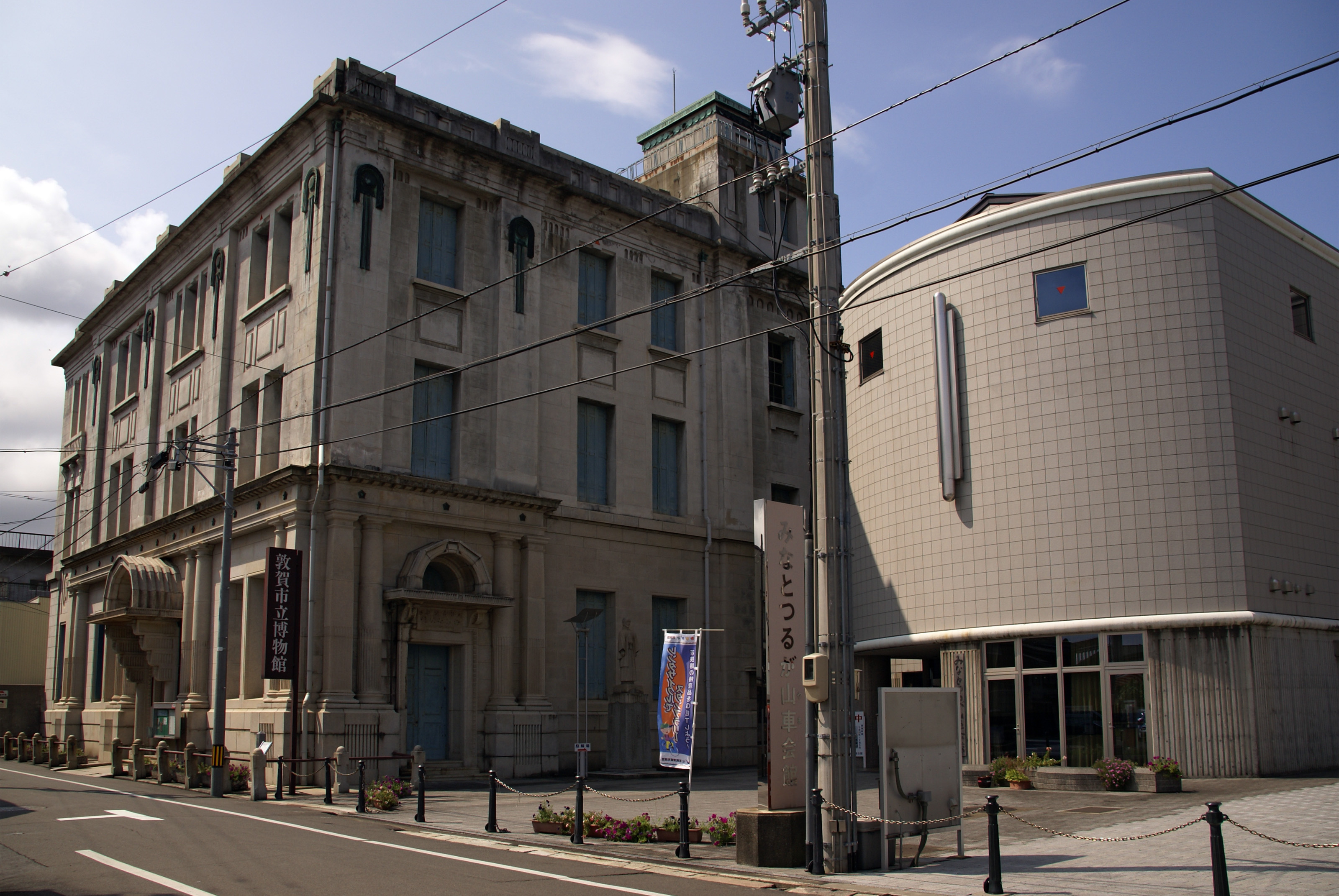 Tsuruga City Museum in Tsuruga, Fukui prefecture, Japan